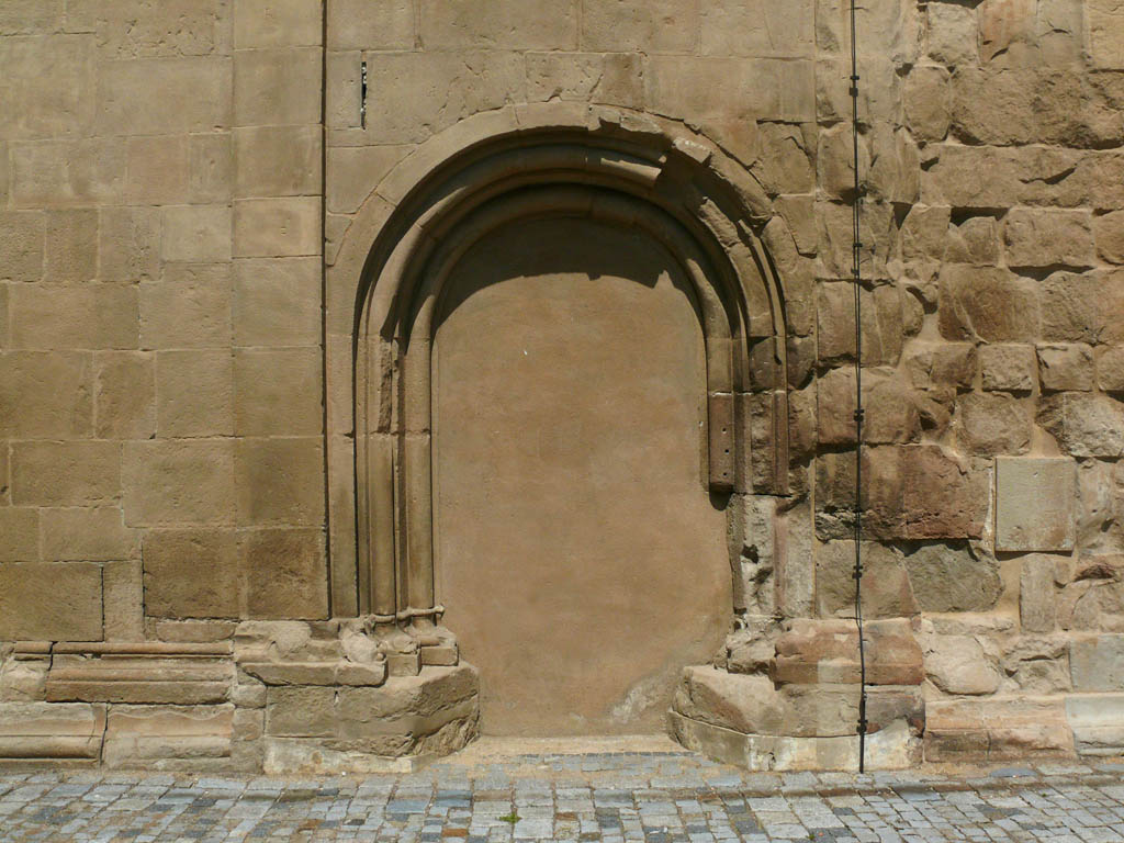 Schöngrabern, Romanische Pfarrkirche - Seitenportal